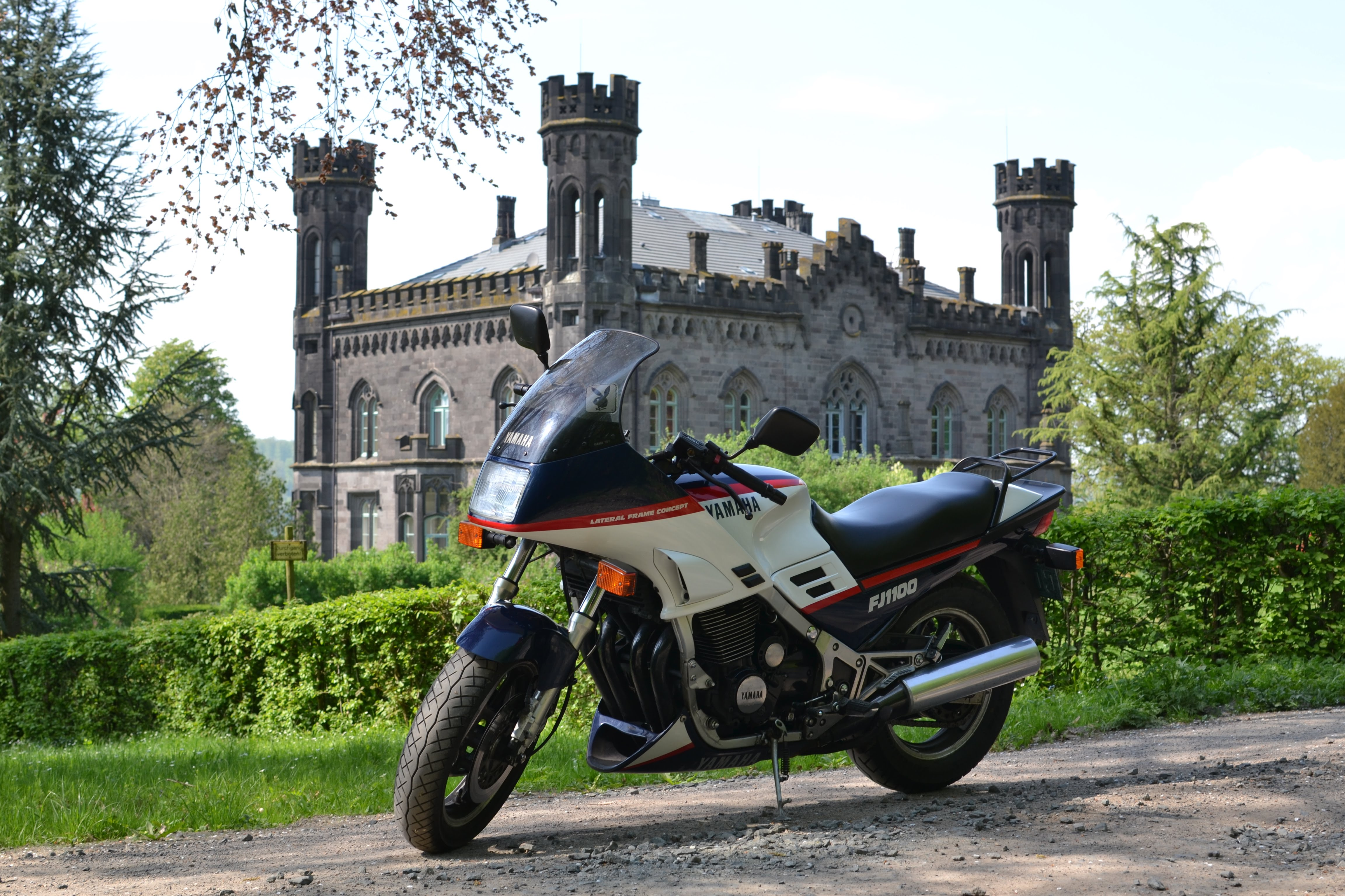 Yamaha FJ 1100 Friedelhausen Motorrad